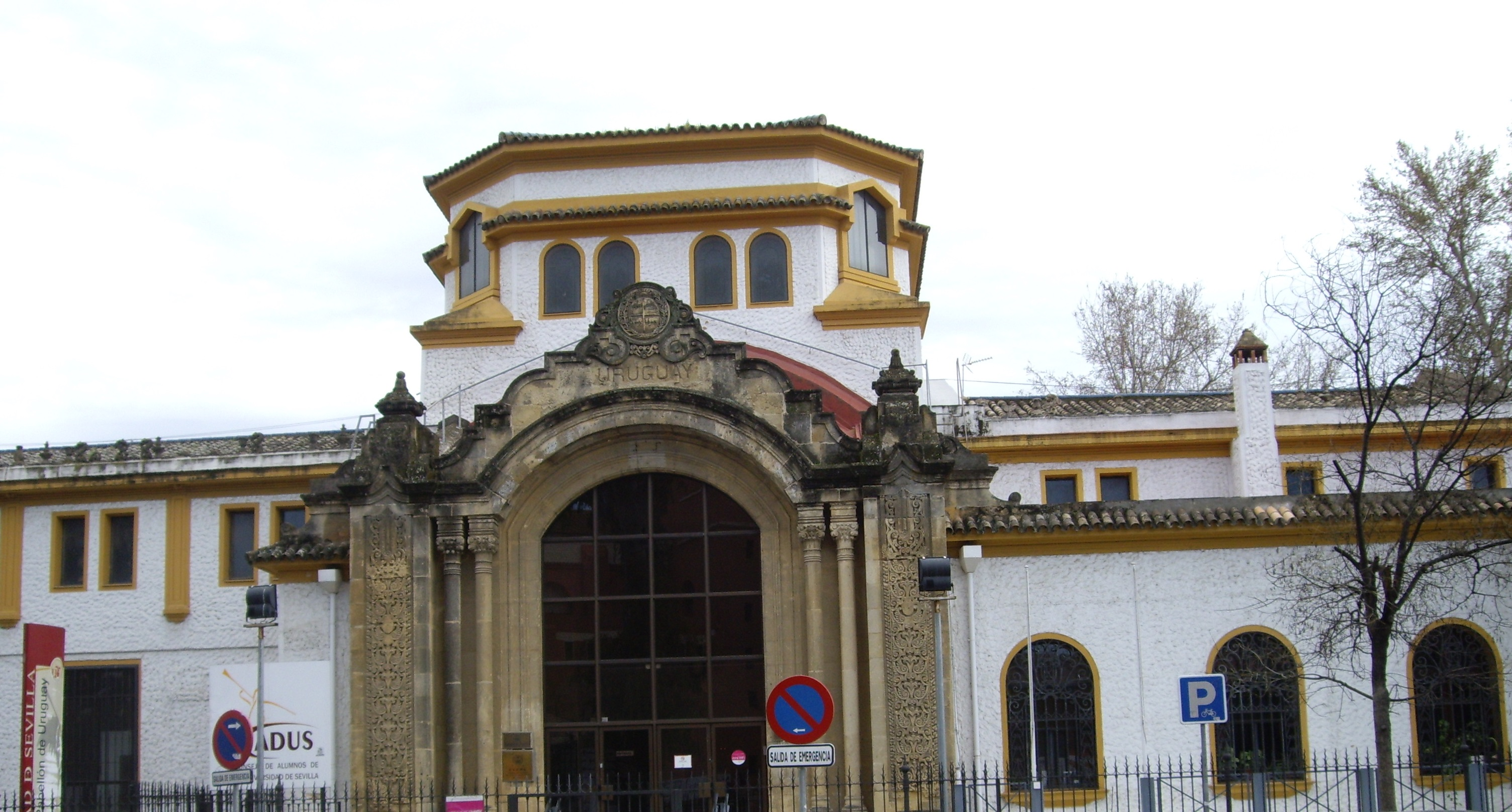 Pabellón de Uruguay de la Exposición Iberoamericana de Sevilla de 1929